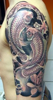 Tätowierung im japanischen Stil (Irezumi) auf dem linken Oberarm